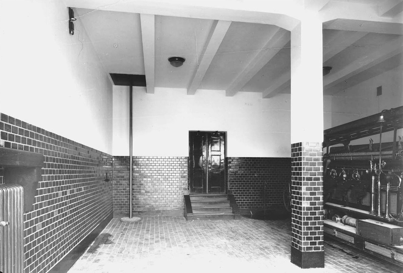 Ulvsunda brandstation, interiör med glidstång